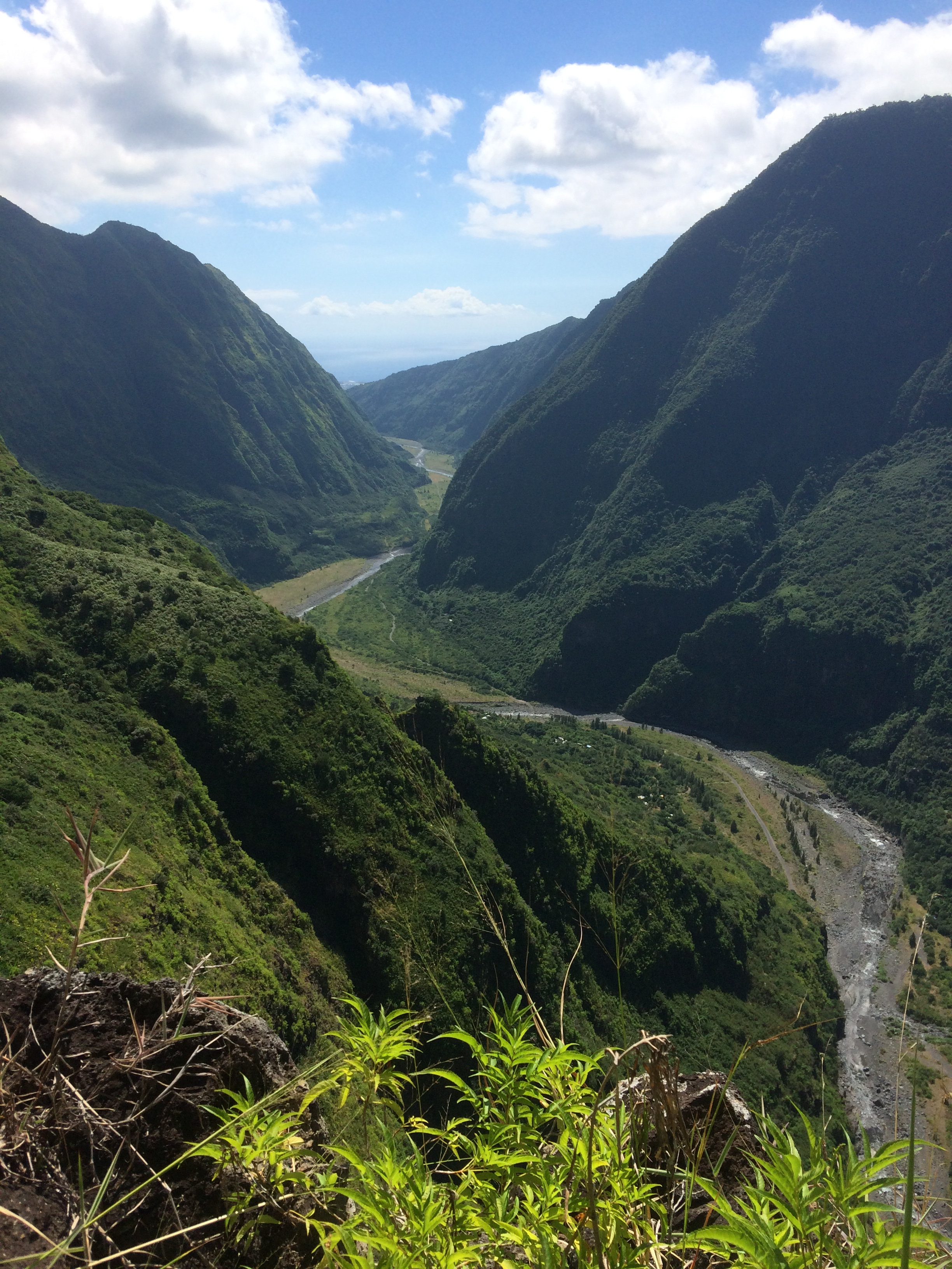 Rivière des Galets (Réunion) vue depuis la canalisation des Orangers